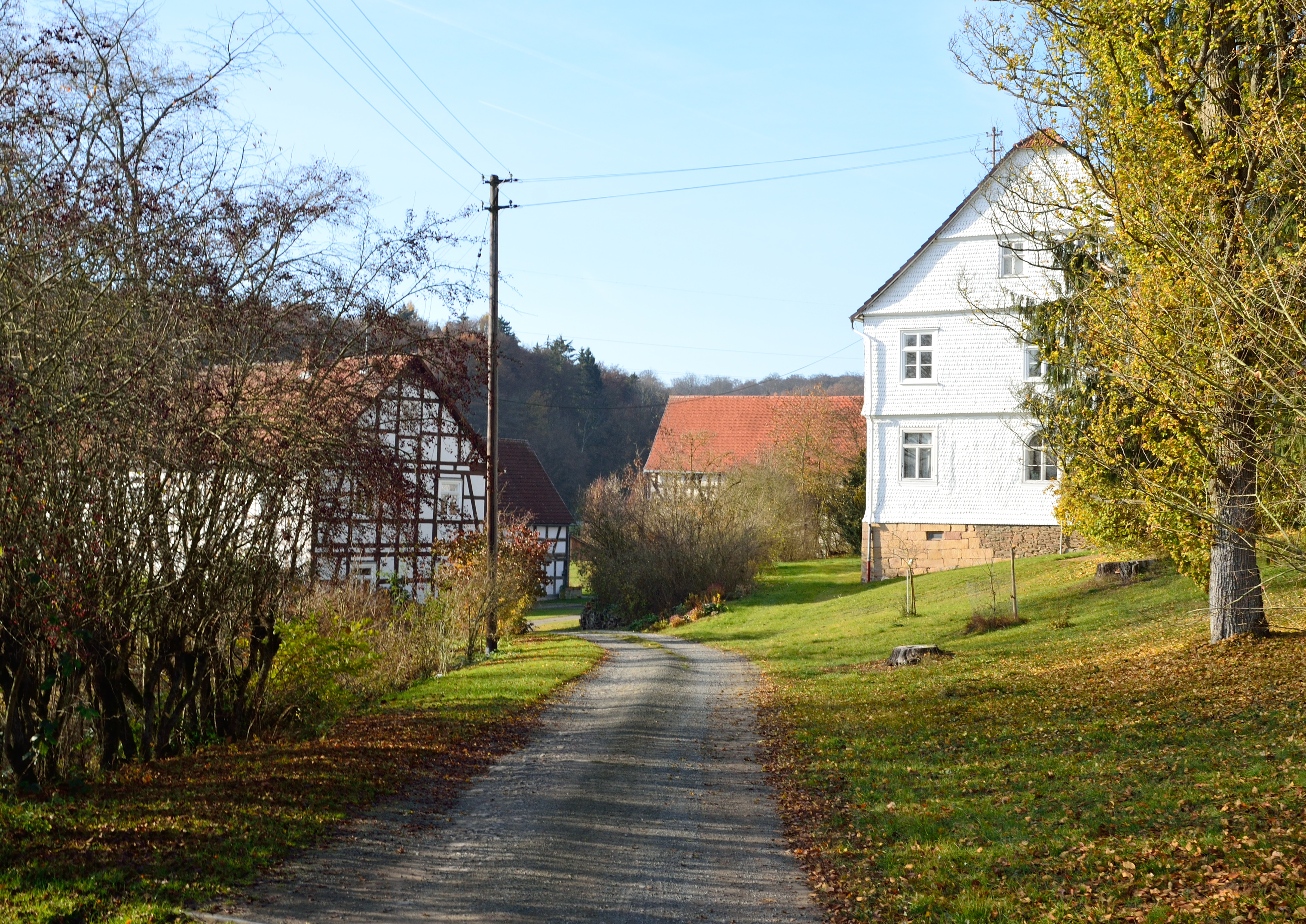 Der zu Oberweimar (Hessen) gehörige Ortsteil Germershausen, ein Rittergut